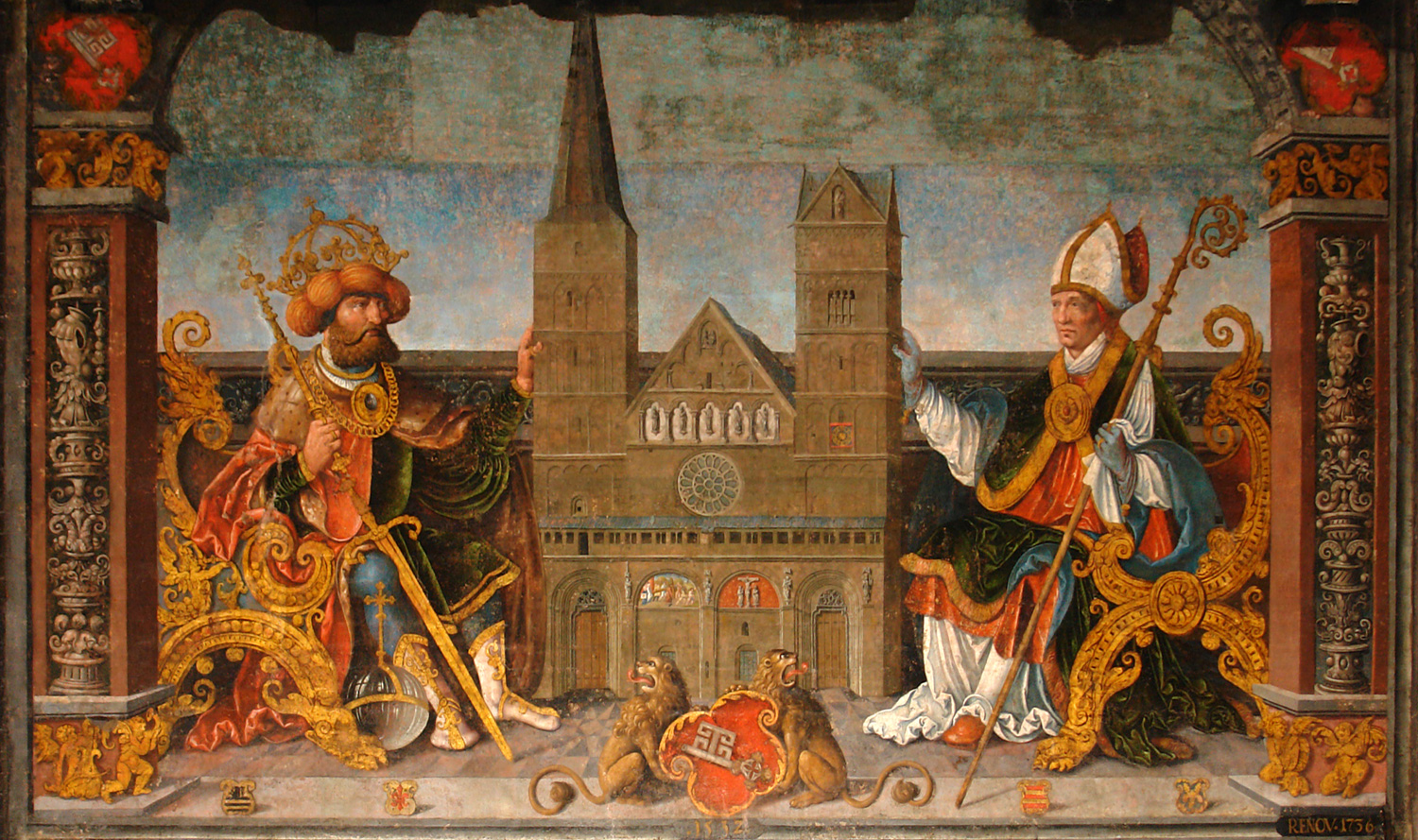 Rathaus in Bremen. Fresco des niederrheinischen Meisters Bartholomäus Bruyn von 1532 in der Oberen Halle. Es zeigt die Gründung des Bistums Bremen durch Kaiser Karl den Großen, der Bischof Willehad das Bistum überträgt; ein Modell des Bremer Dom – in seiner Form von 1532 – befindet sich zwischen den Beiden.